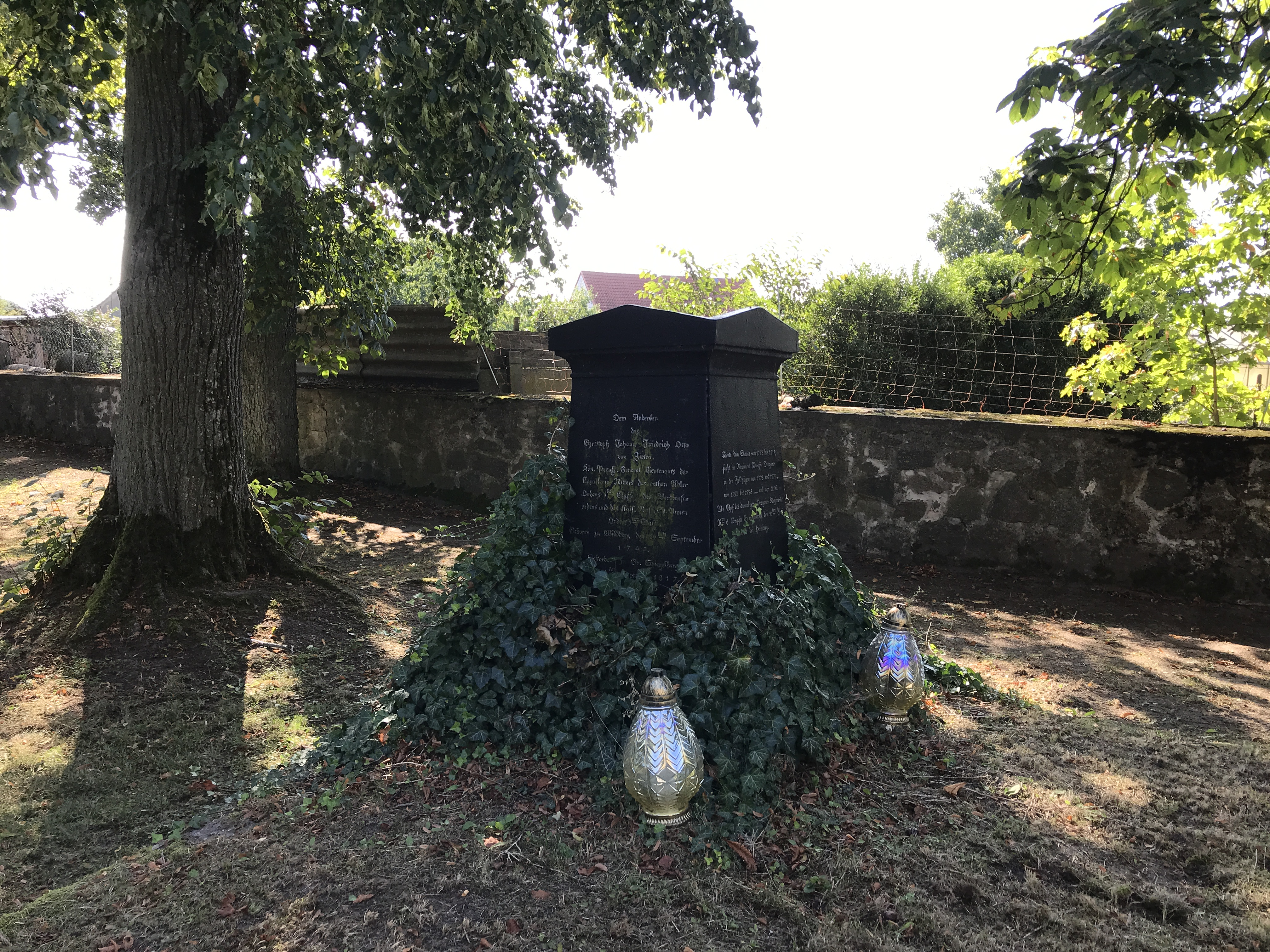 Die Kirche Groß Spiegelberg ist eine verputzte Feldsteinkirche in Groß Spiegelberg, einem Ortsteil der Gemeinde Jatznick im Landkreis Vorpommern-Greifswald in Mecklenburg-Vorpommern. Im Innern steht unter anderem ein Kanzelkorb aus dem 18. Jahrhundert.